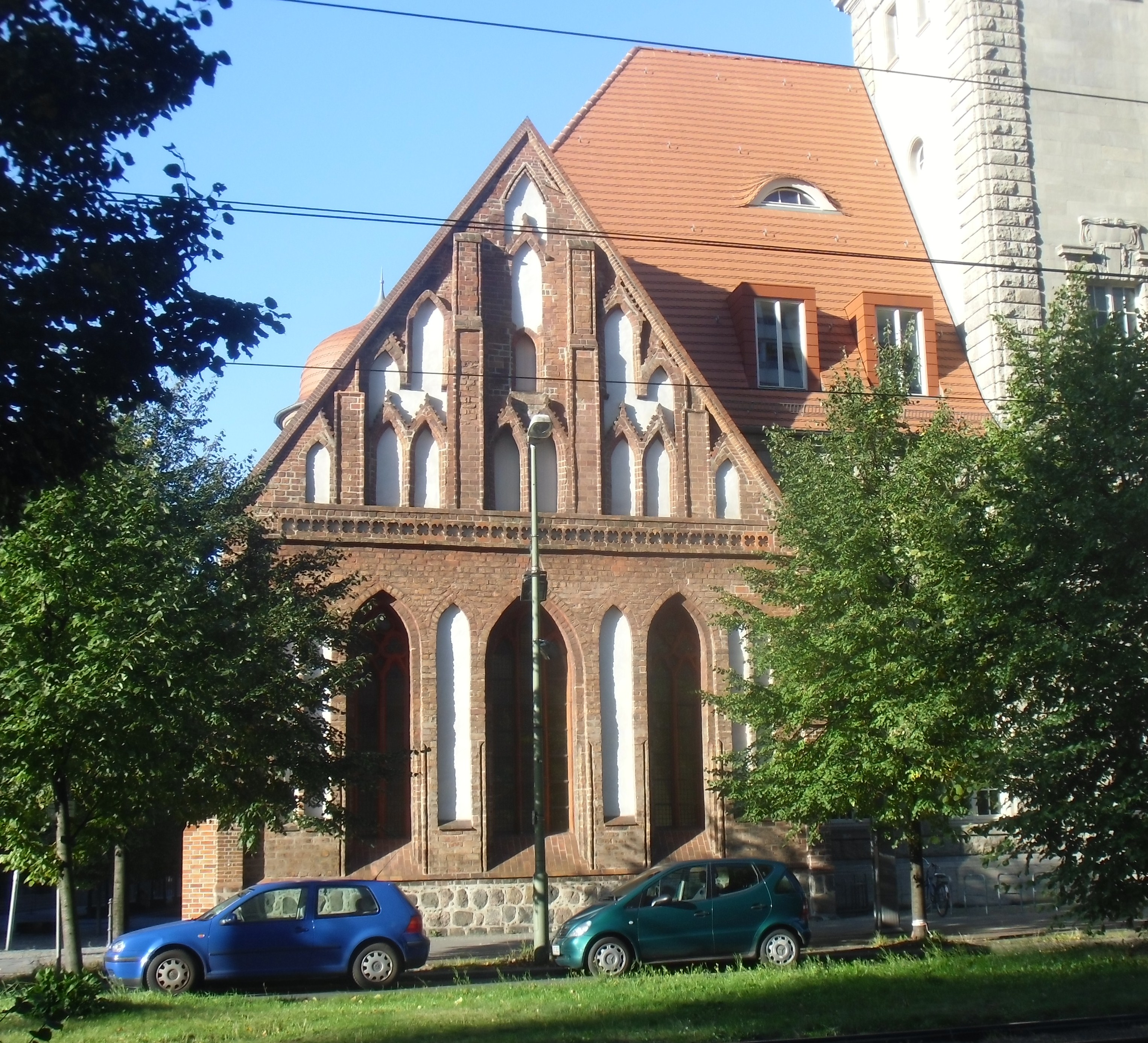 Denkmalgeschützte Kapelle aus dem 14. Jahrhundert, ehemals Teil des Heilig-Geist-Spitals, jetzt integriert in die Wirtschaftswissenschaftliche Fakultät der Humboldt-Universität in der Spandauer Straße, Berlin-Mitte